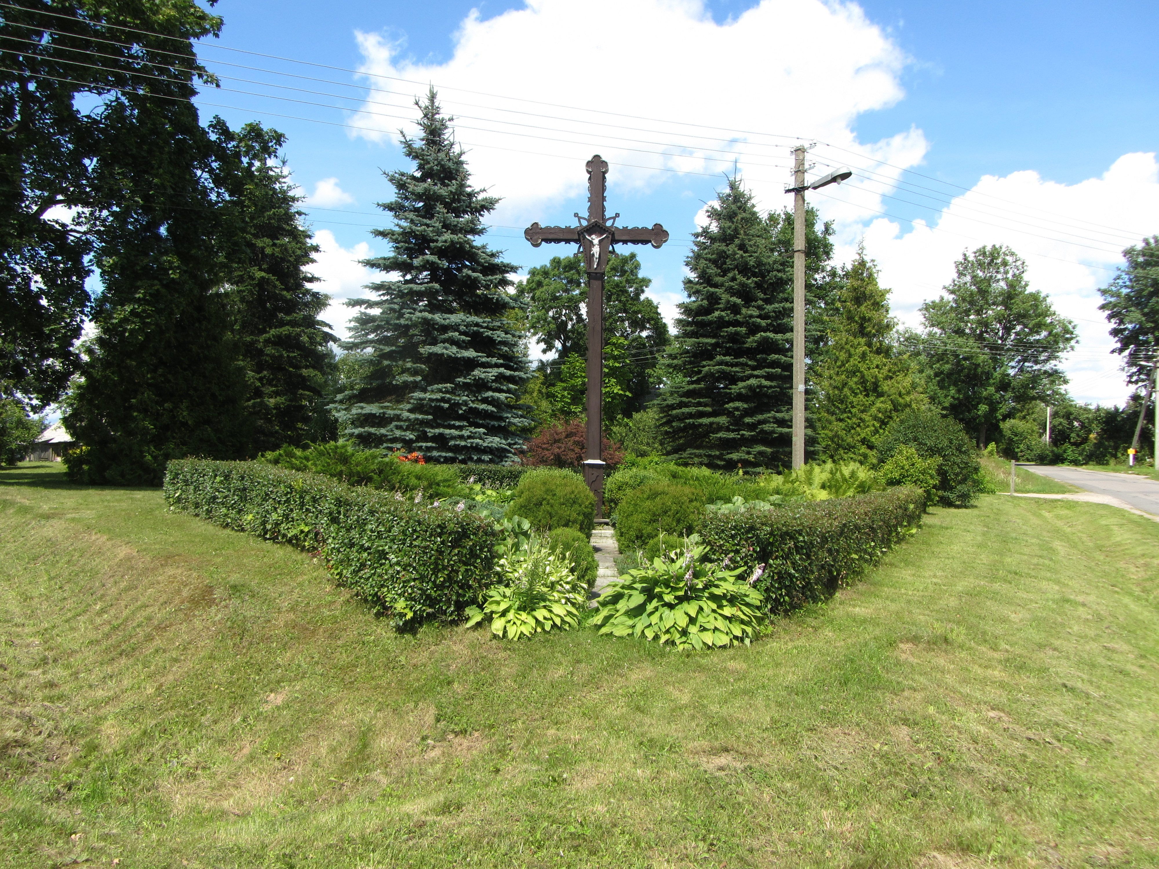 Zadvarninkai, Lithuania